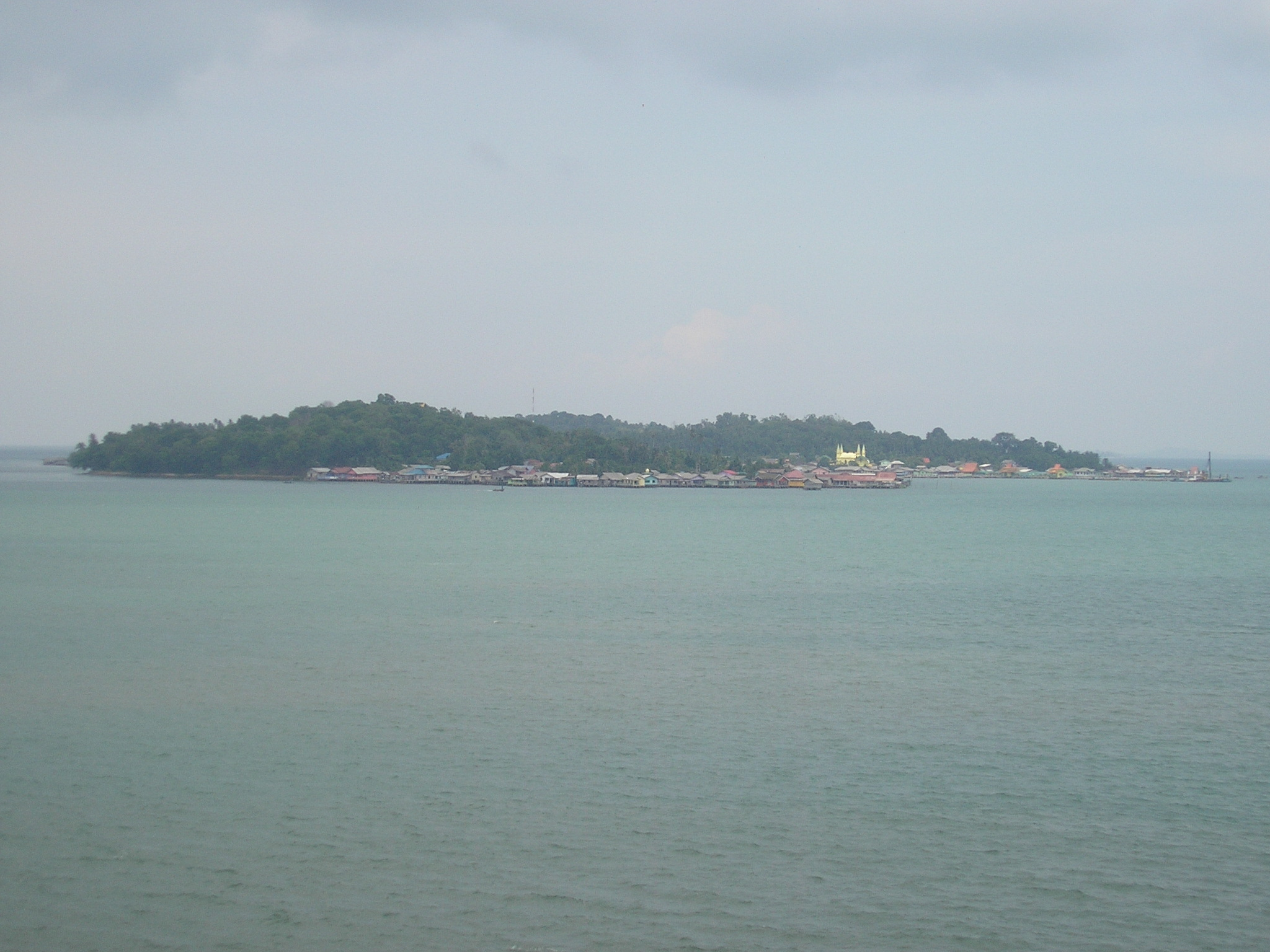 Pulau Penyengat near Tanjung Pinang